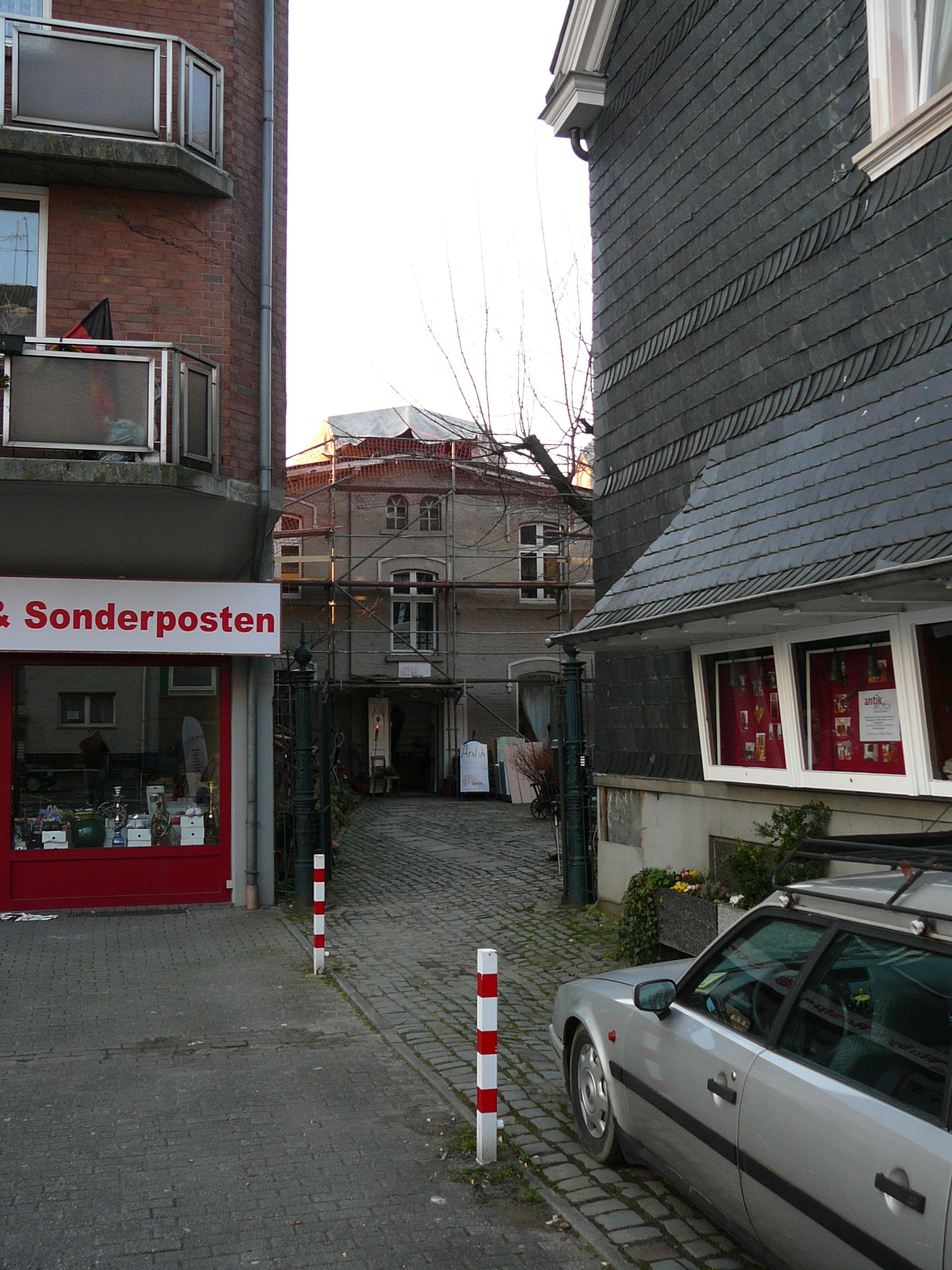 Friedrich-Engels-Allee, Wuppertal